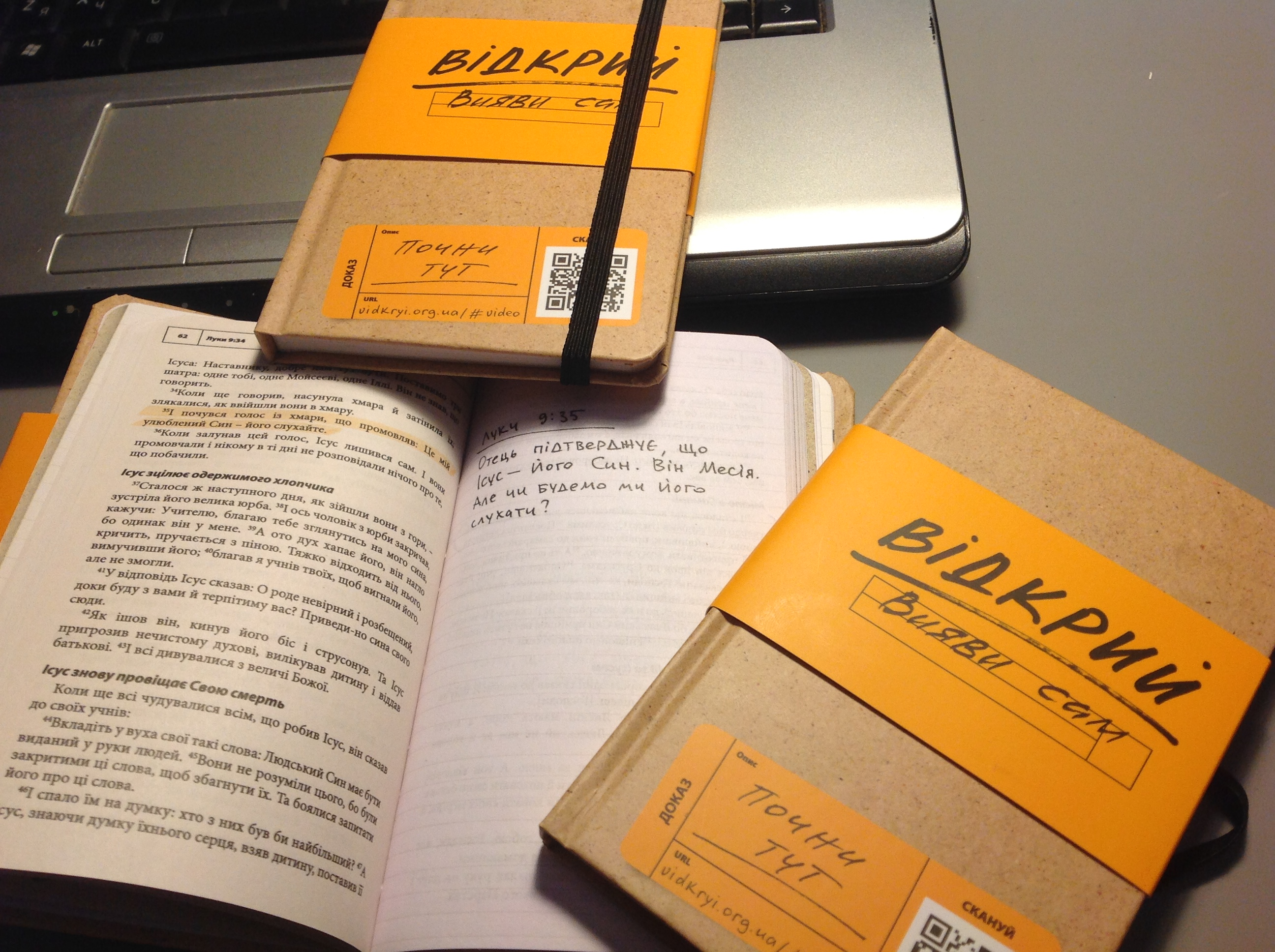 У січні 2017 року "ССХ Україна" вперше видала україномовний варіант особливого молодіжного Євангелія від Луки "Відкрий. Вияви сам". 153-сторінкове українське видання надруковане у вигляді блокноту, що містить новозаповітний текст в перекладі о. Рафаїла Турконяка 1997 року. При цьому кожна сторінка євангельського оповідання межує із чистими аркушами для особистих нотаток при читанні.